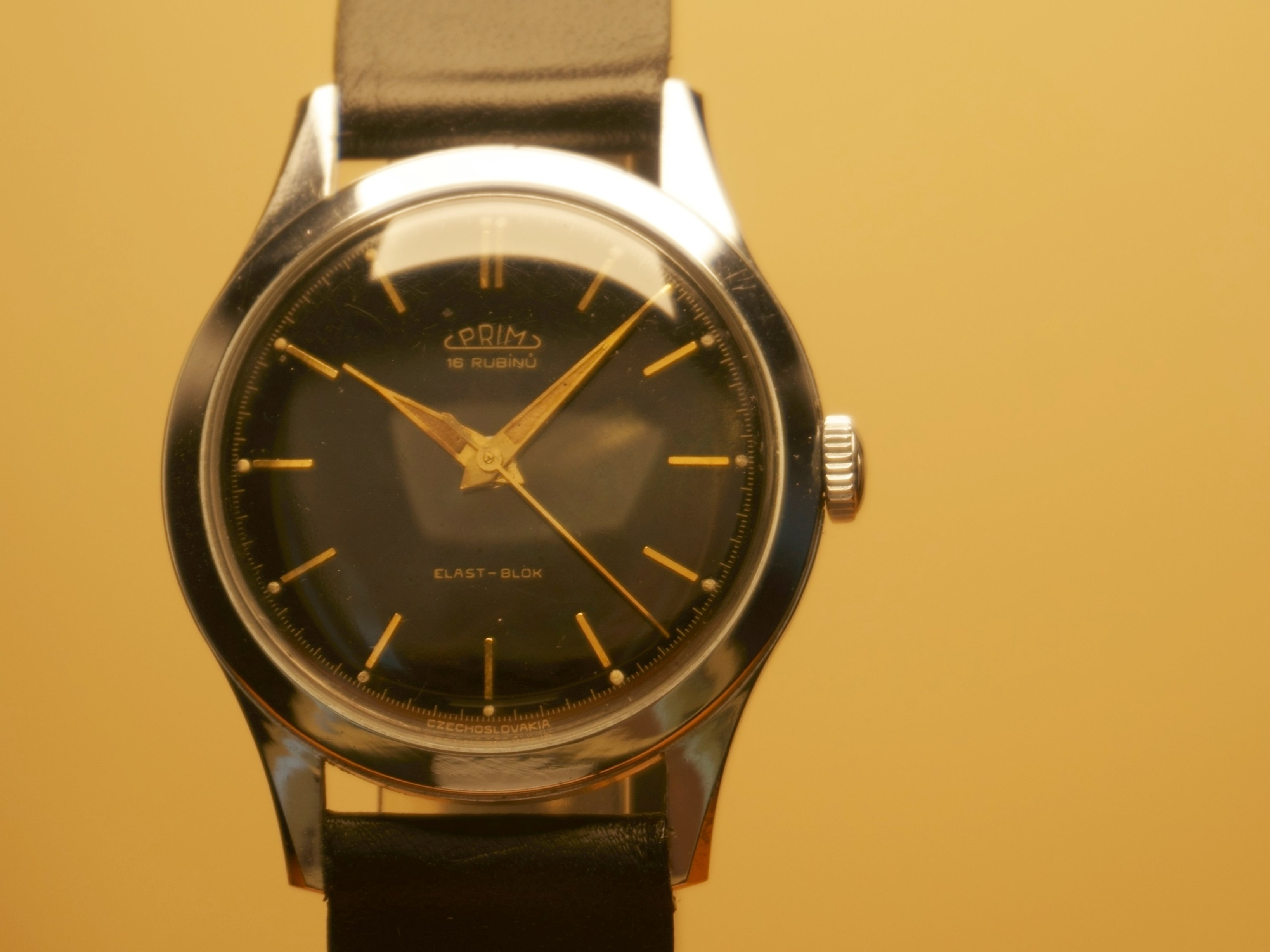 Nové město nad Metují, městské muzeum, expozice věnovaná hodinové značce Prim (do roku 1994), hodinky chráněné proti nárazu systémem Elast-Blok.